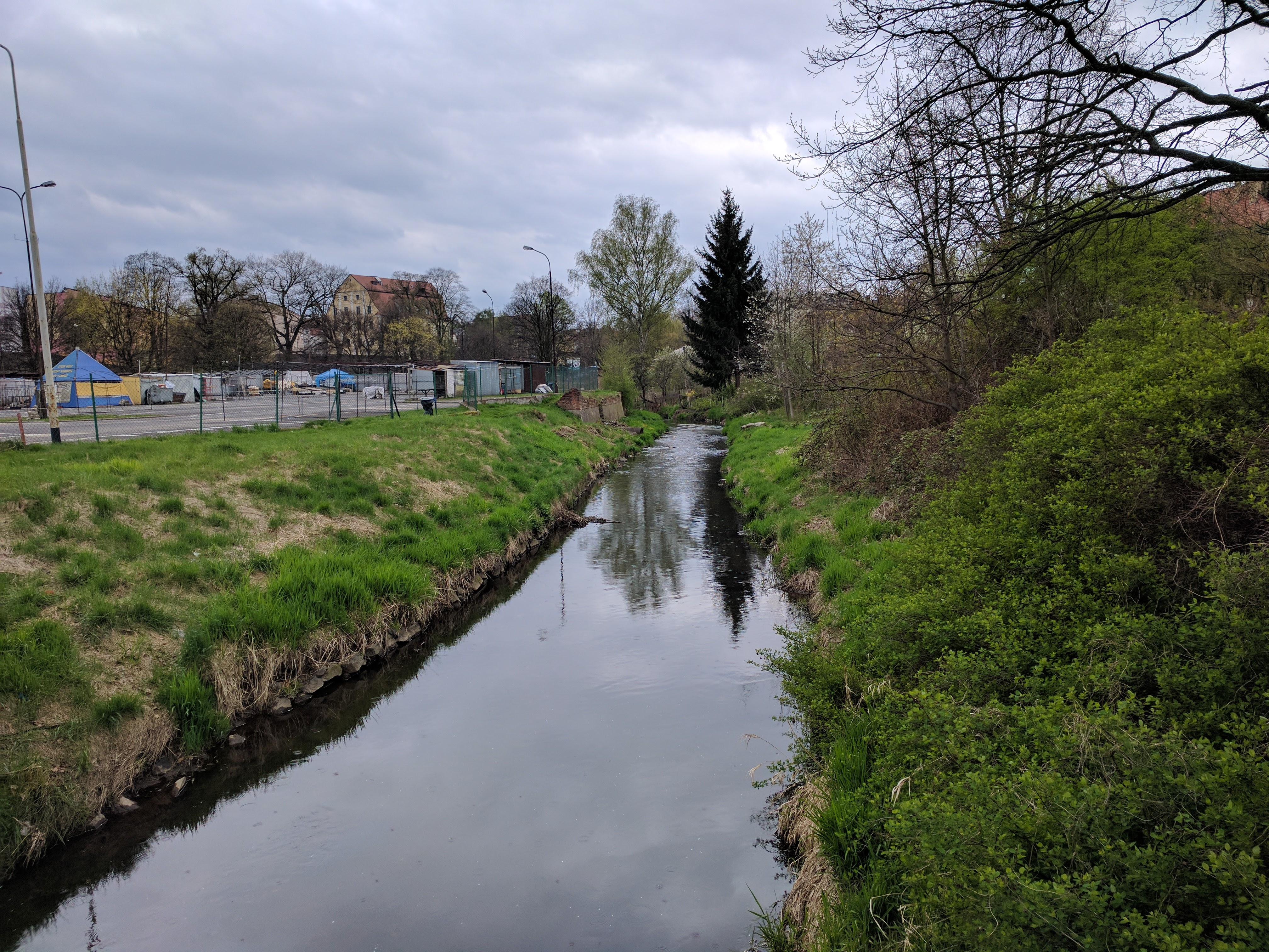 Siekierka w Lubaniu. Po lewej stronie plac targowy. Z tyłu most pod ul. Jana Pawła II.